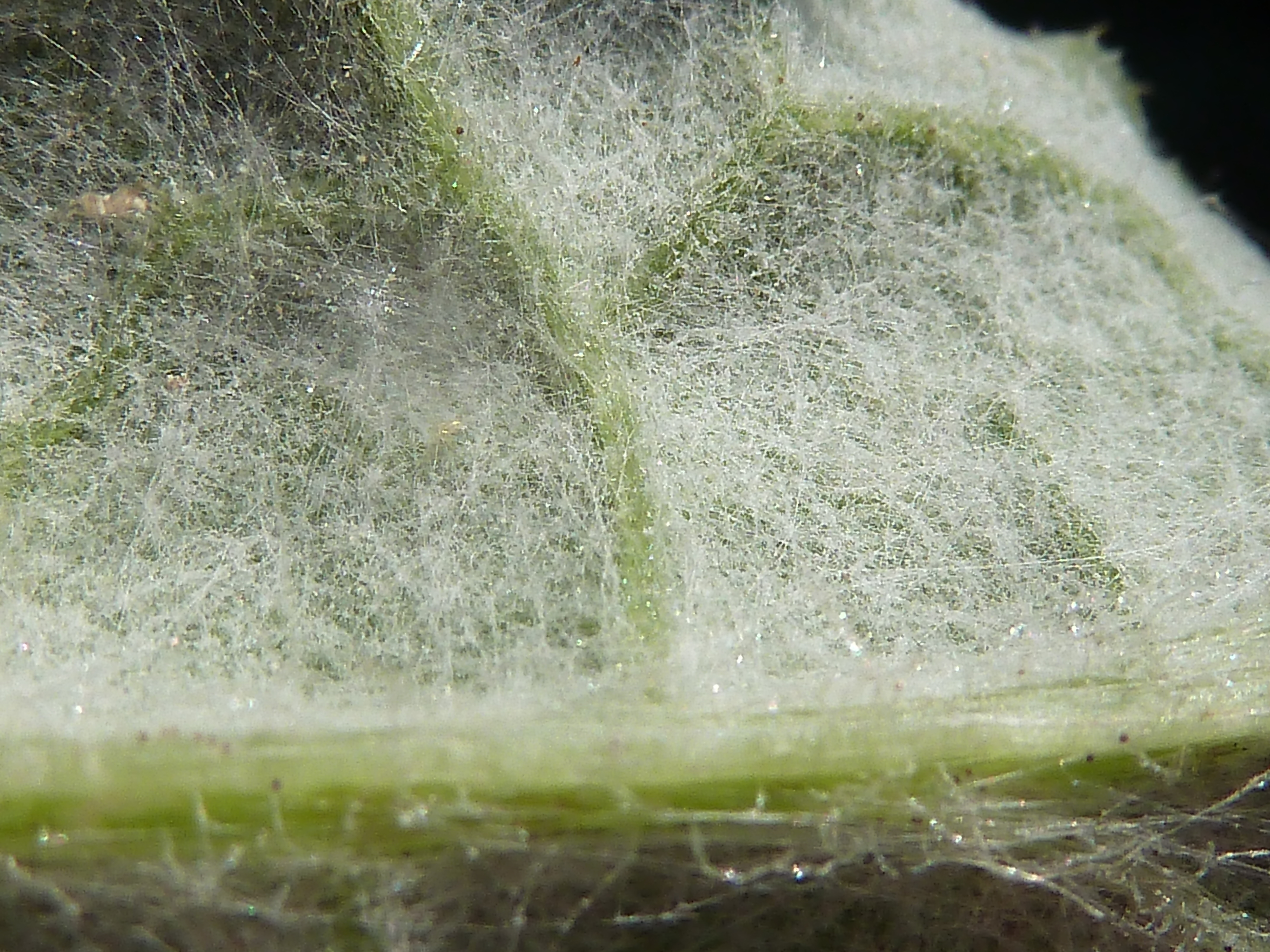 Carduus pycnocephalus (Cardo, cardo borriquero, cardo negro) - Hoja caulinar: envés, detalle del denso indumento araneoso. - Descampado circa Biblióteca, Albatera (Provincia de Alicante, Espàña).